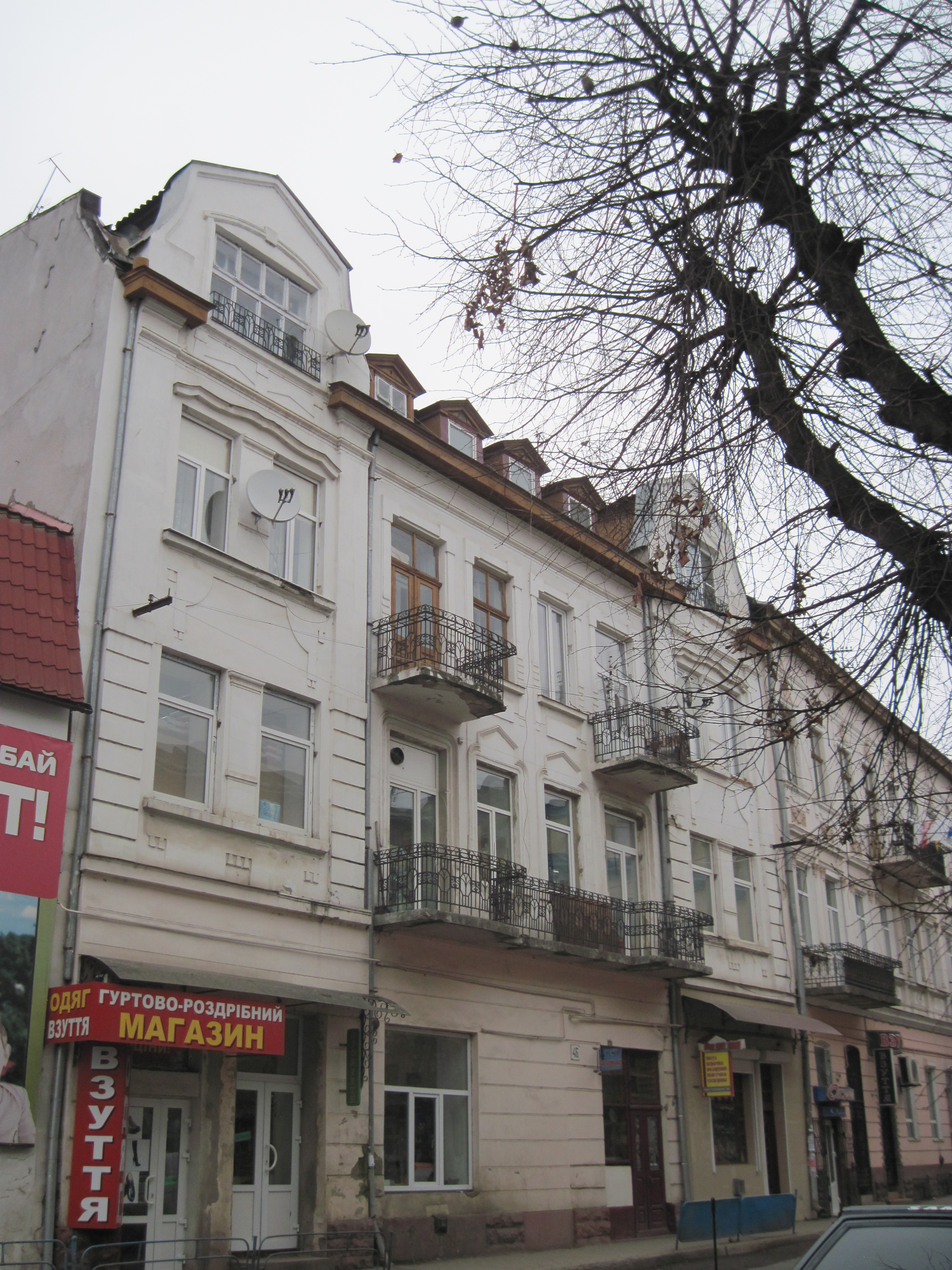 Будинок, Бучач, 2014